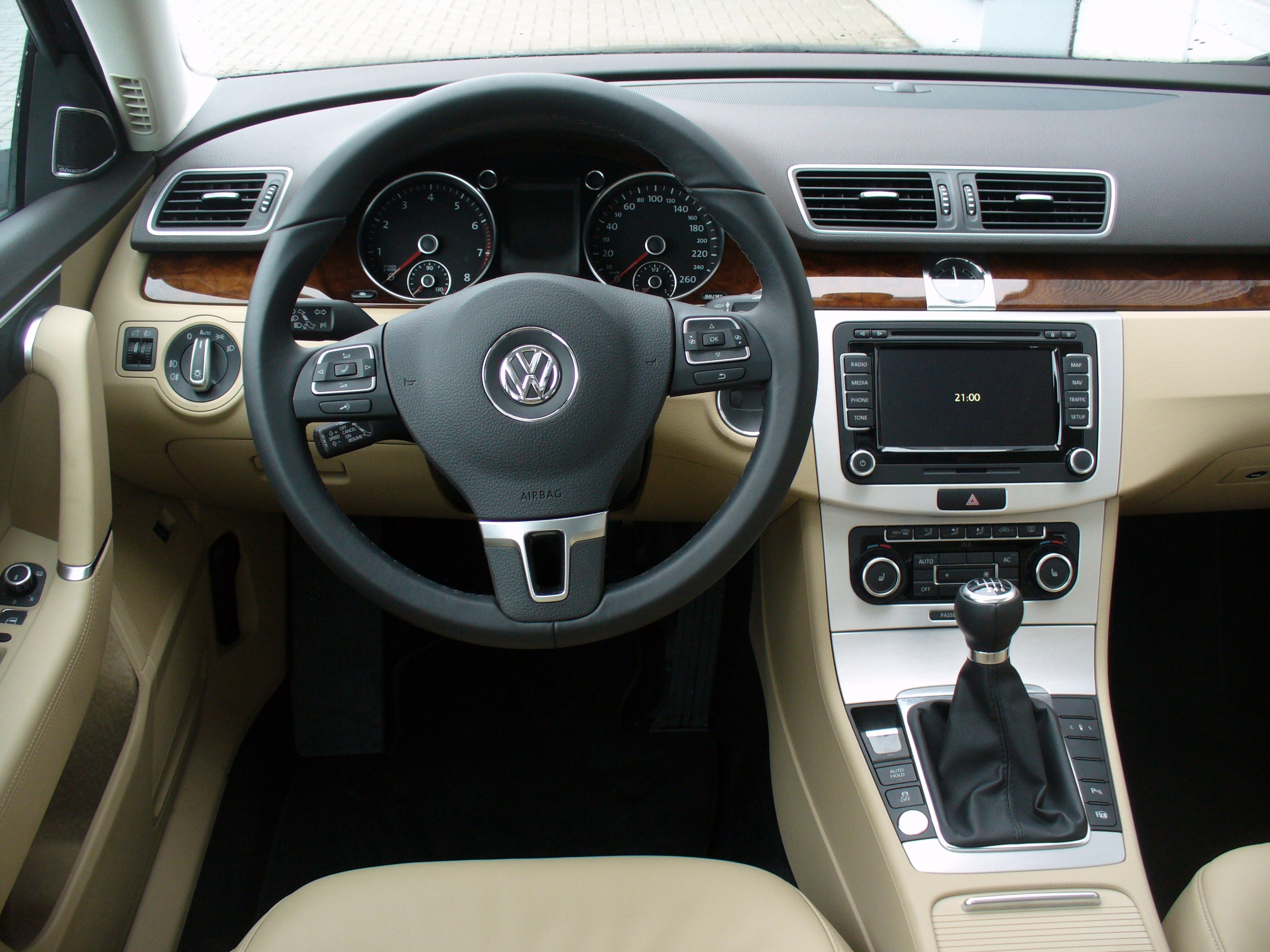 VW Passat Variant B7